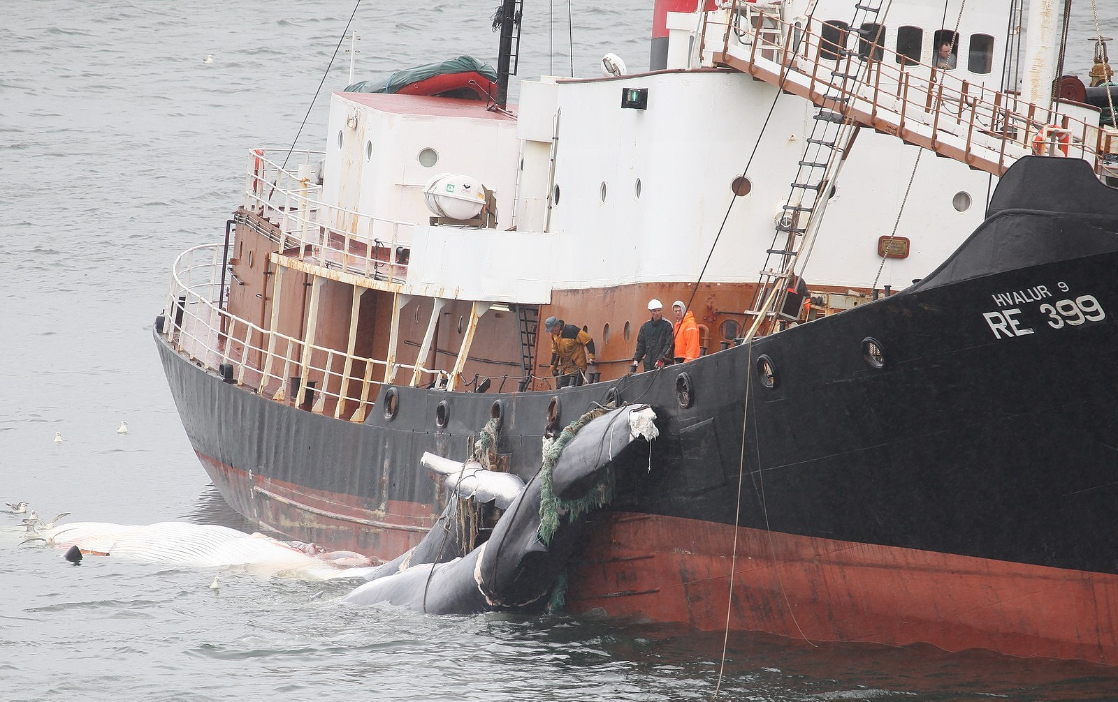 Hvalskurður í Hvalfirði